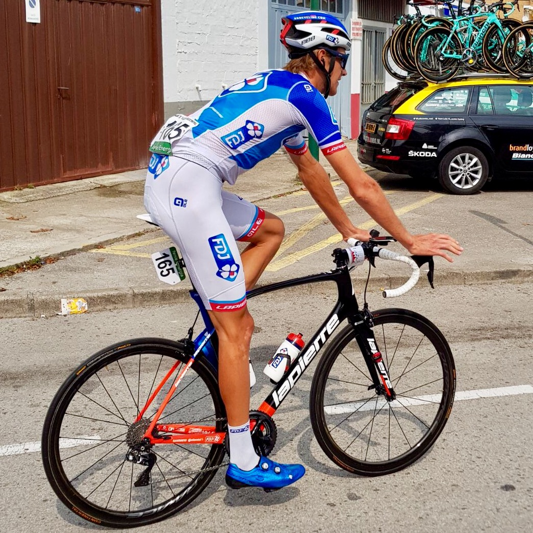 El ciclista sueco Tobias Ludvigsson (FDJ) en la 18ª etapa de la Vuelta a España 2017